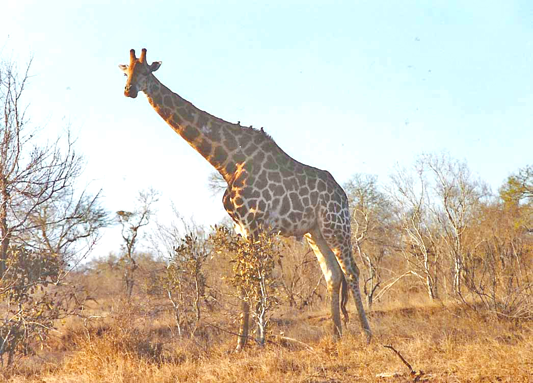 Giraff am Krügerpark.